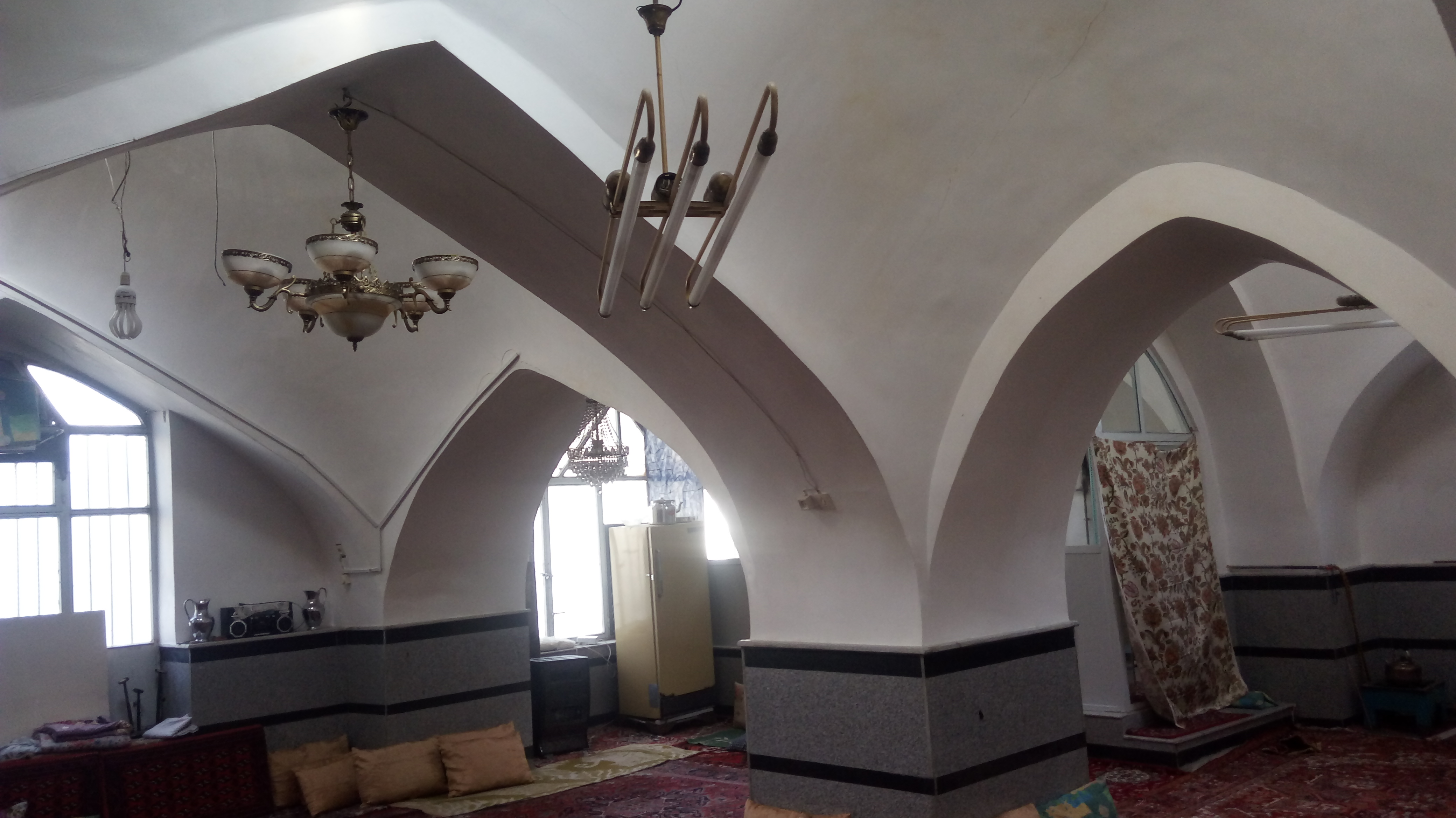 قراملک